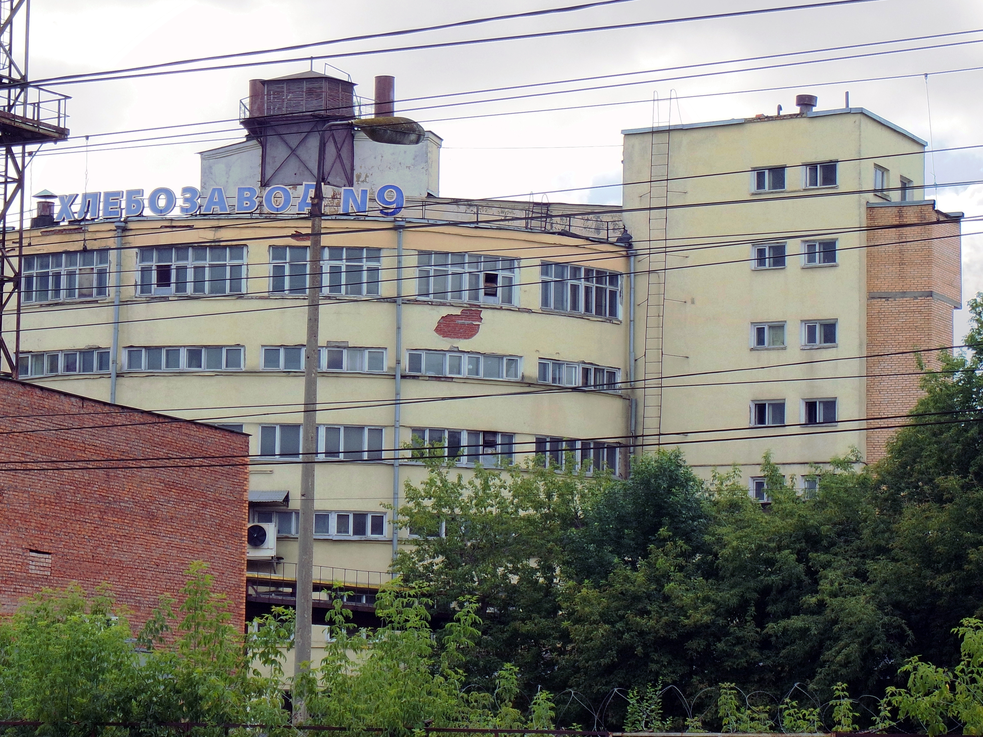 Khlebozavod 9 (mechanized bakery in Moscow), view from railway